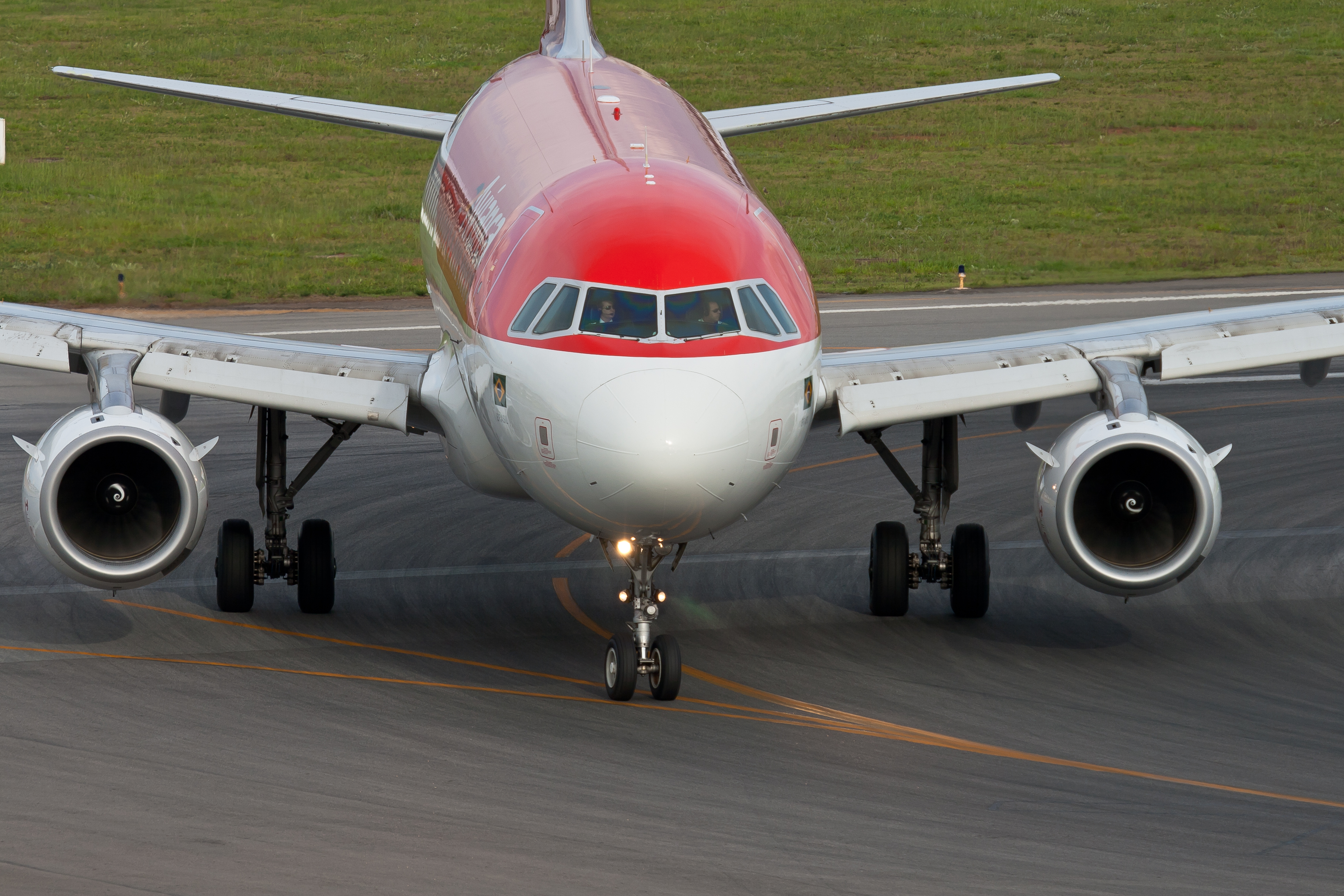 Airbus A318-122